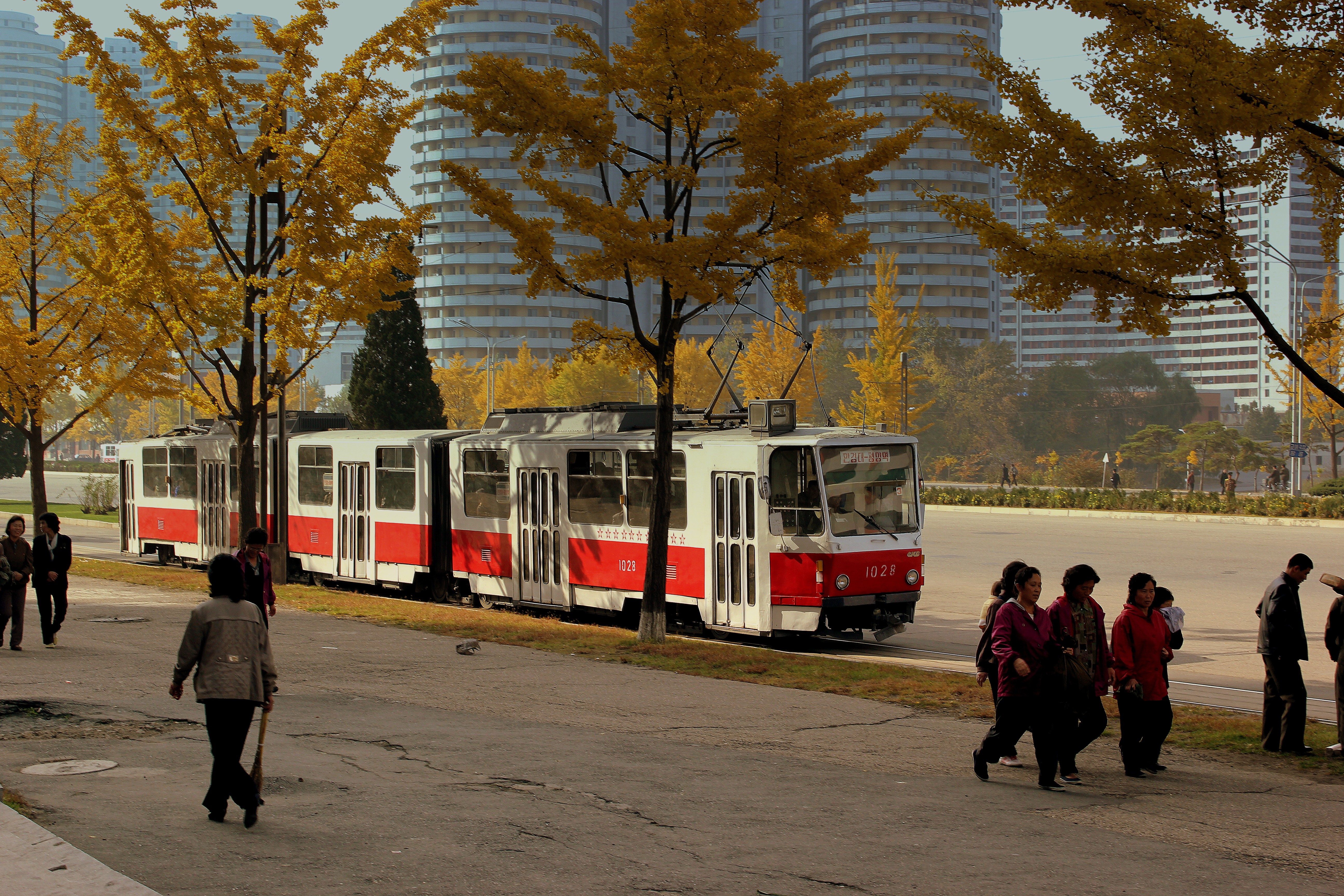 Tatra tram in Pyongyang, October 2012